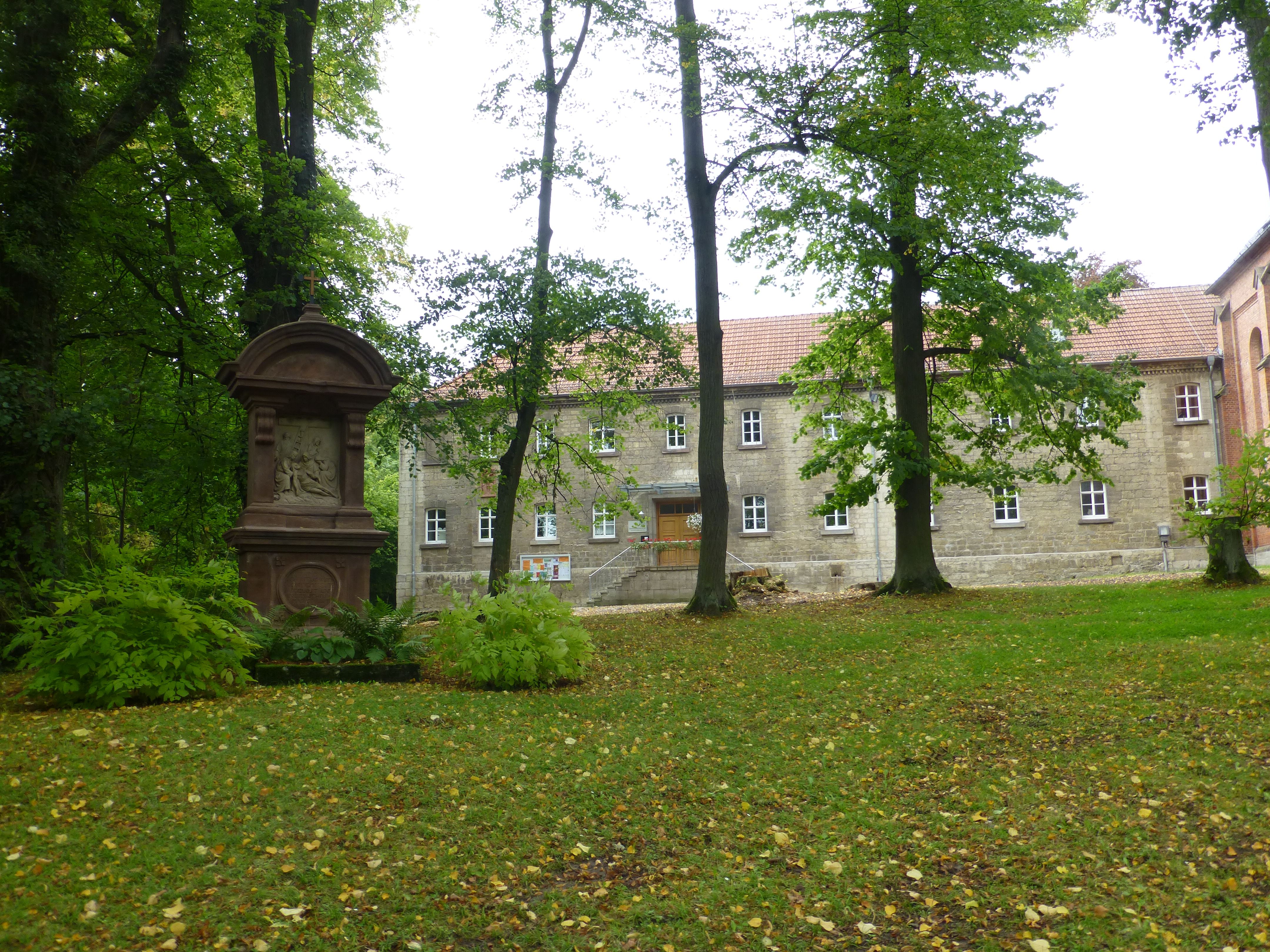 Blick zum Kloster auf dem Kerbschen Berg